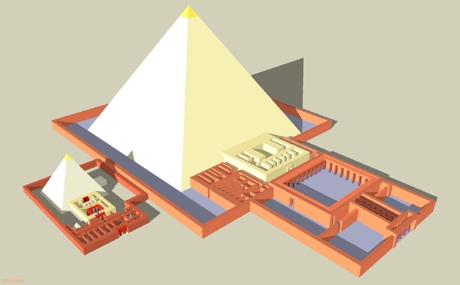 Essai d'élévation des pyramides royales de Néferirkarê Kakaï et de Khentkaous II à Abousir - Ve dynastie égyptienne